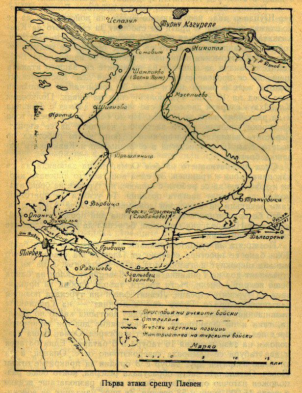 първа атака на Плевен